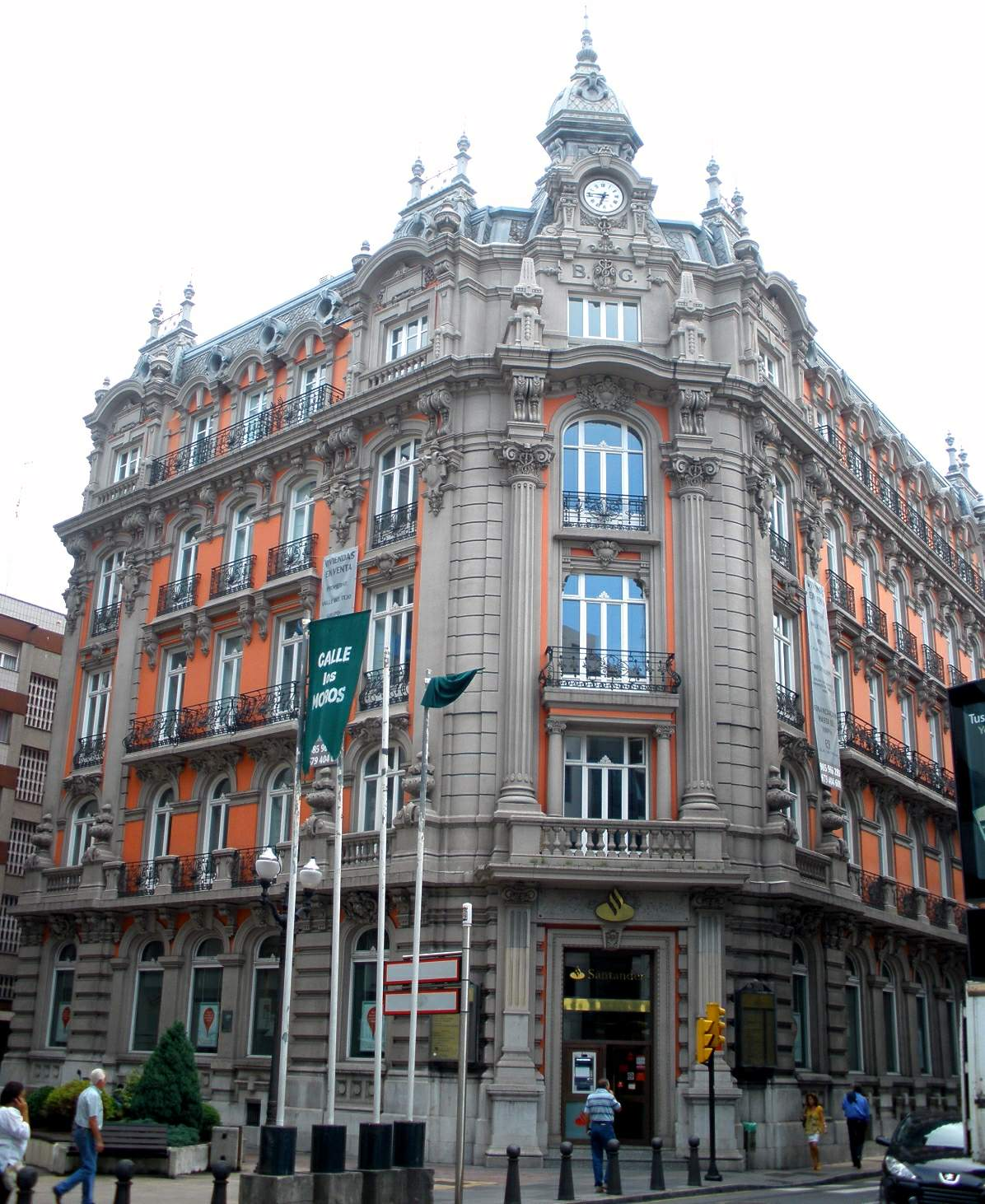 Edificio del Antiguo Banco de Gijón, hoy perteneciente al Grupo Santander (Gijón)